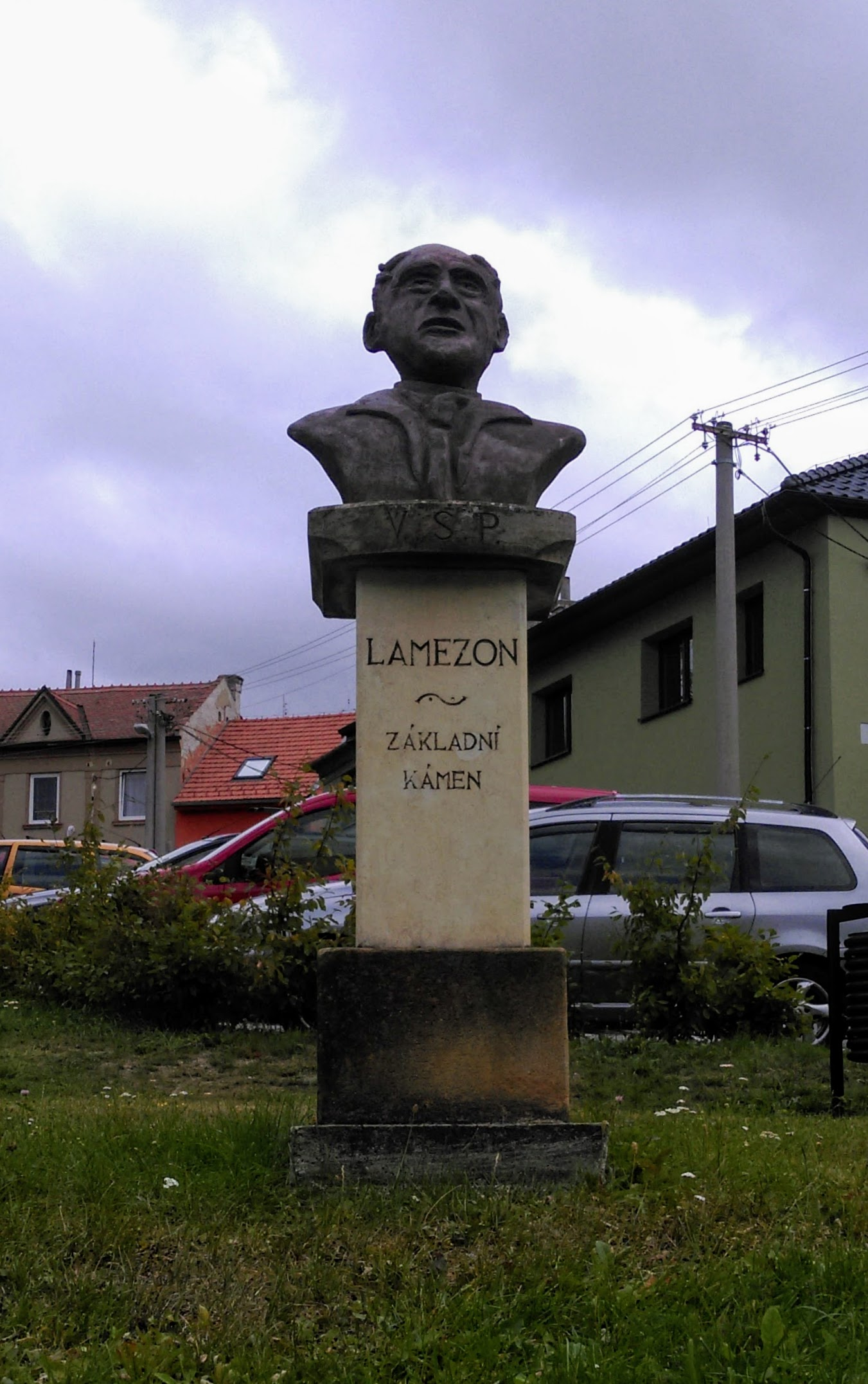 Lamezon - základní kámen - Václav Svoboda Plumlovský od Ellen Jilemnické